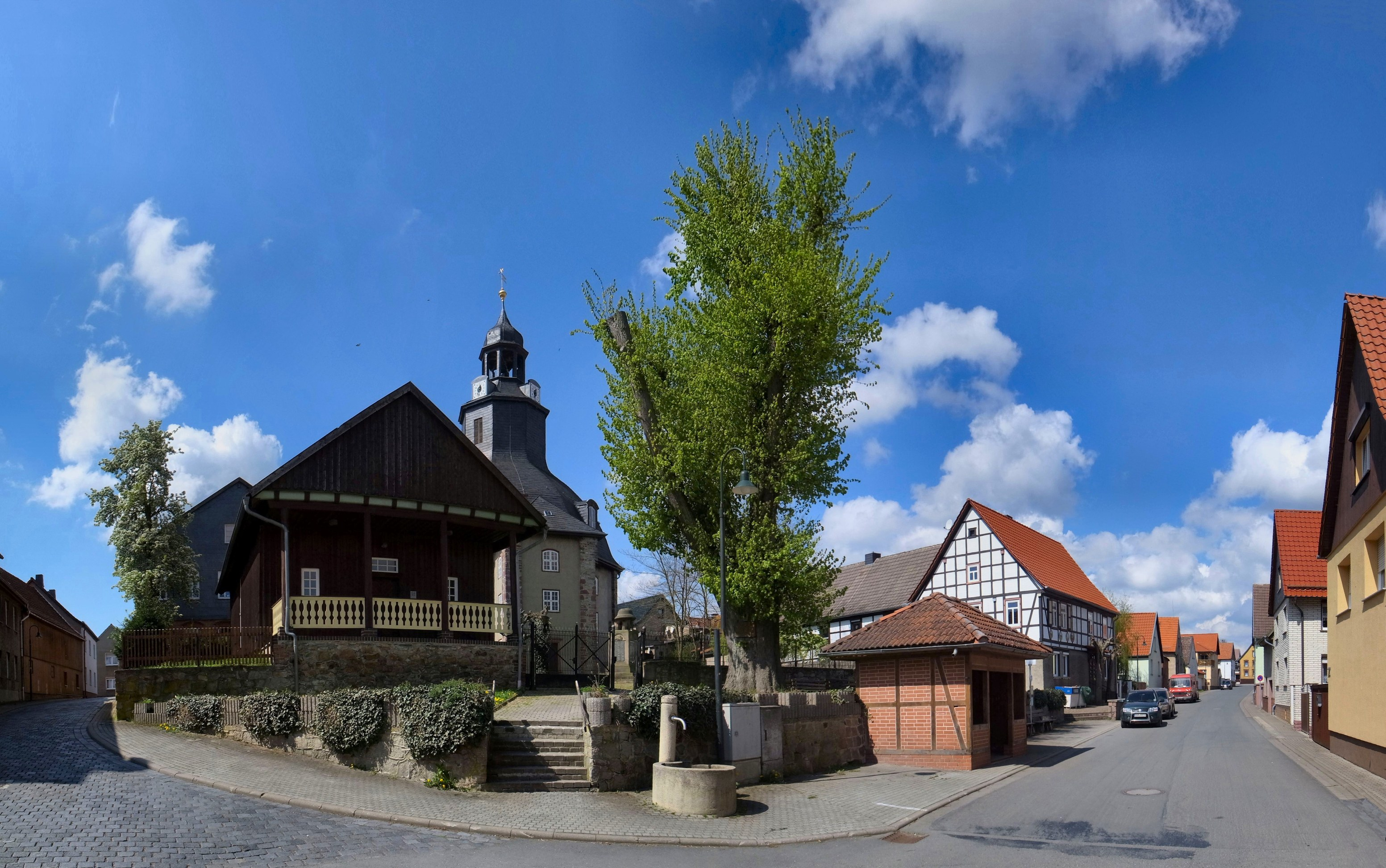 Schwenda, Dorfplatz, mit Kirche und Lindenbaum von 1797 (Quelle: Informationstafel an der Linde)